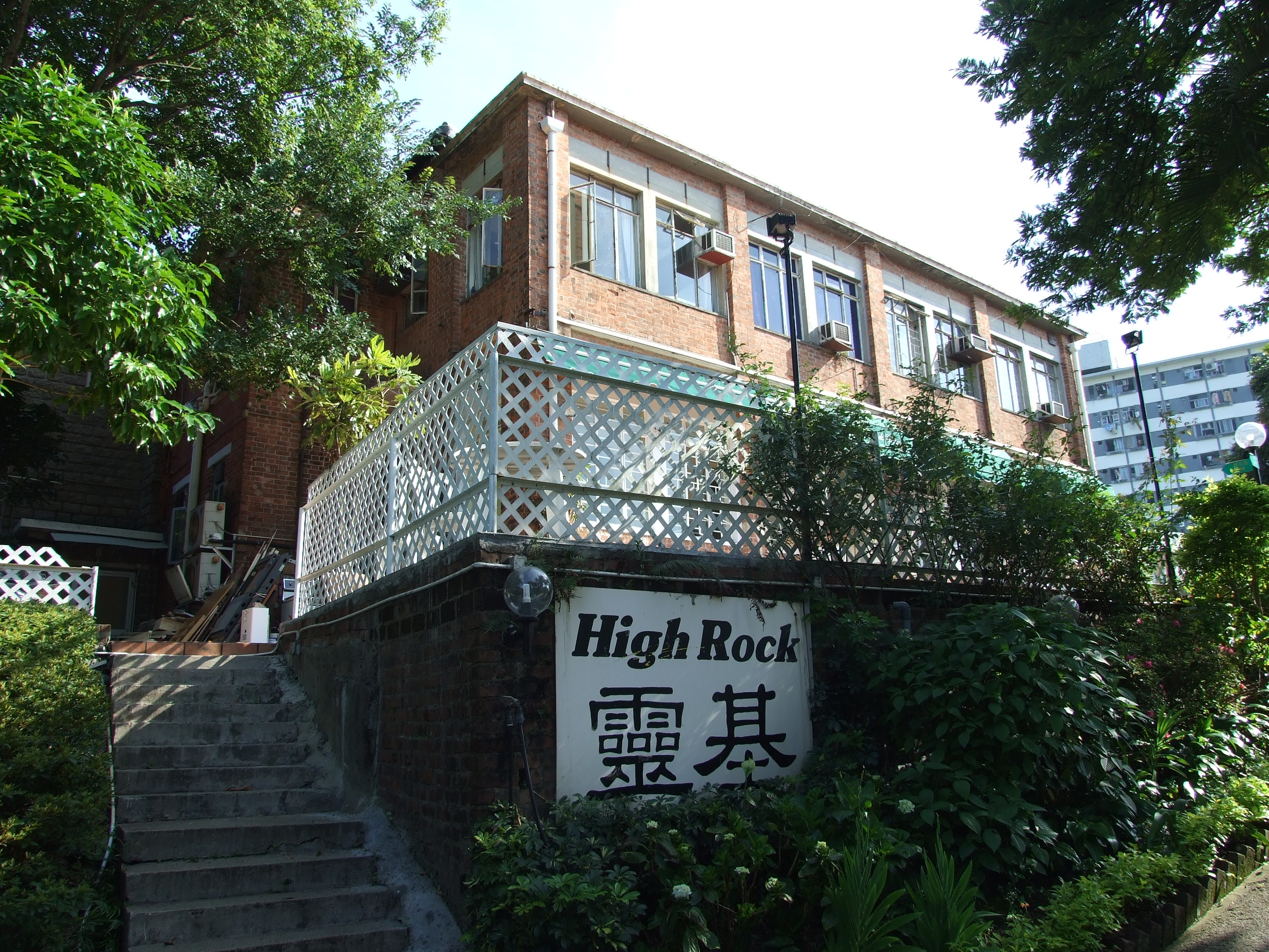 中文（香港）: 位於小山丘上的靈基營